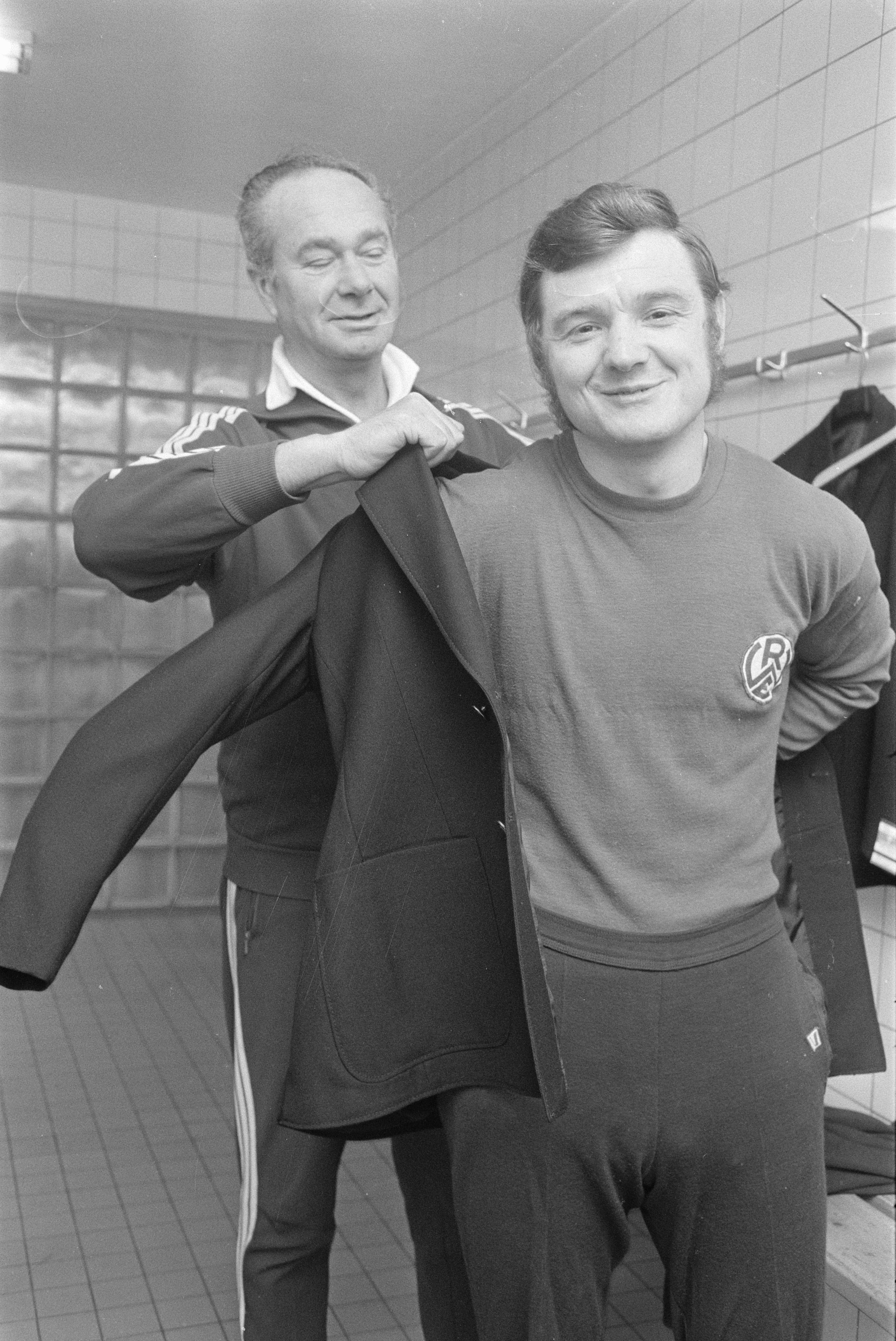 Collectie / Archief : Fotocollectie Anefo Reportage / Serie : [ onbekend ] Beschrijving : Selectie voor Nederlands elftal traint voor wedstrijd tegen Luxemburg, Zeist; Fadrhonc helpt Lippens in nieuw kostuum Datum : 15 februari 1971 Locatie : Luxemburg, Zeist Trefwoorden : sport, voetbal Persoonsnaam : Fadrhonc, František Fotograaf : Verhoeff, Bert / Anefo Auteursrechthebbende : Nationaal Archief Materiaalsoort : Negatief (zwart/wit) Nummer archiefinventaris : bekijk toegang 2.24.01.05 Bestanddeelnummer : 924-2686